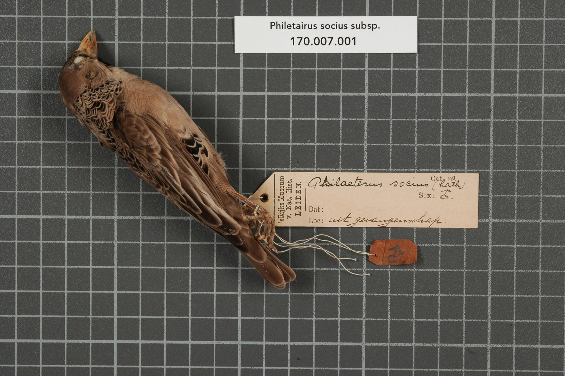 Philetairus socius subsp.